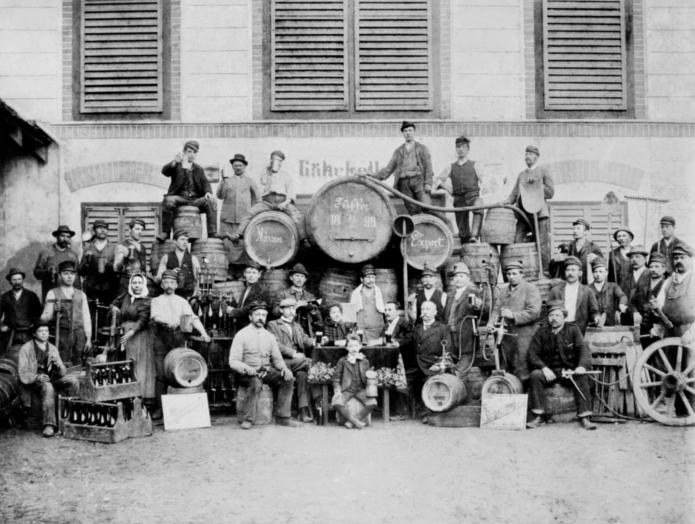 Slika iz časa pivovarja Simona Kukca